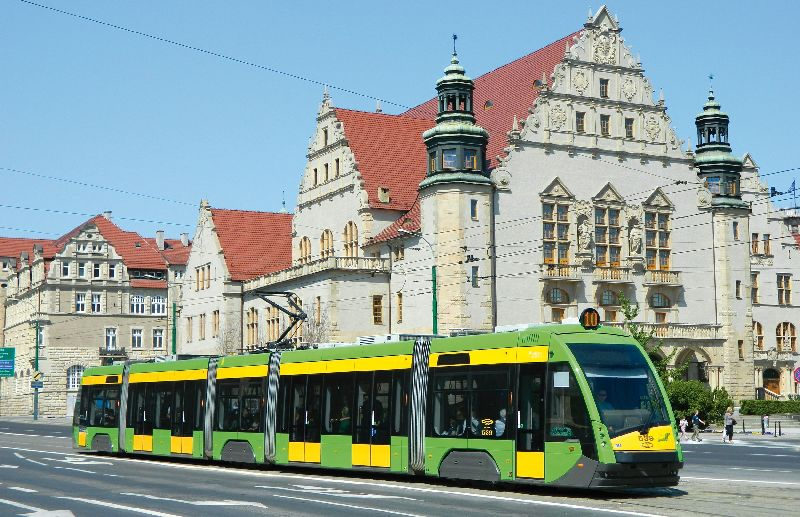 Tramino